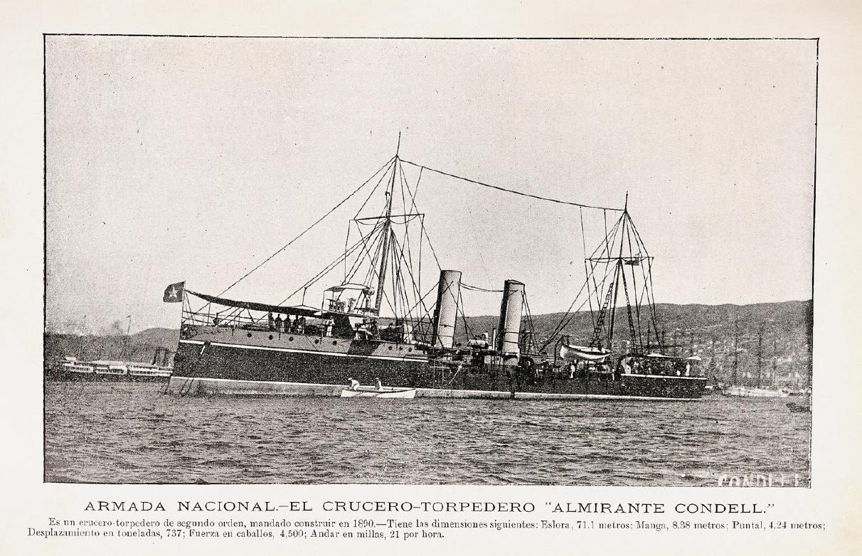 El crucero-torpedero Almirante Condell en 1903.